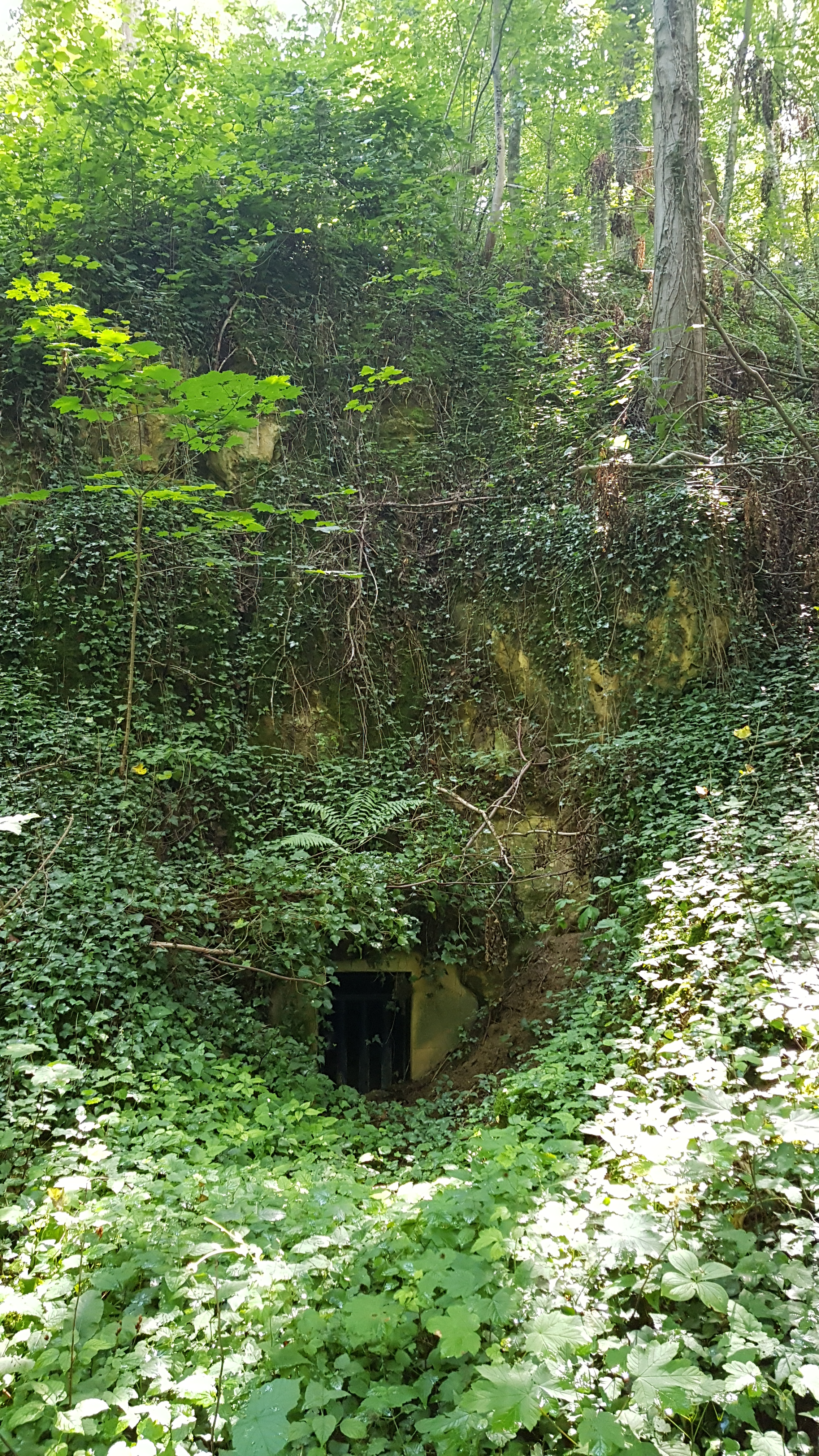 Nevenkoelebosgroeve, Bemelen, Nederland